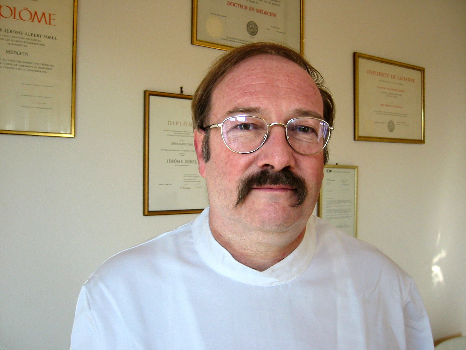 Dr Sobel, président d’Exit Suisse romande. Image tirée du film « EXIT, le droit de mourir » de Fernand Melgar.